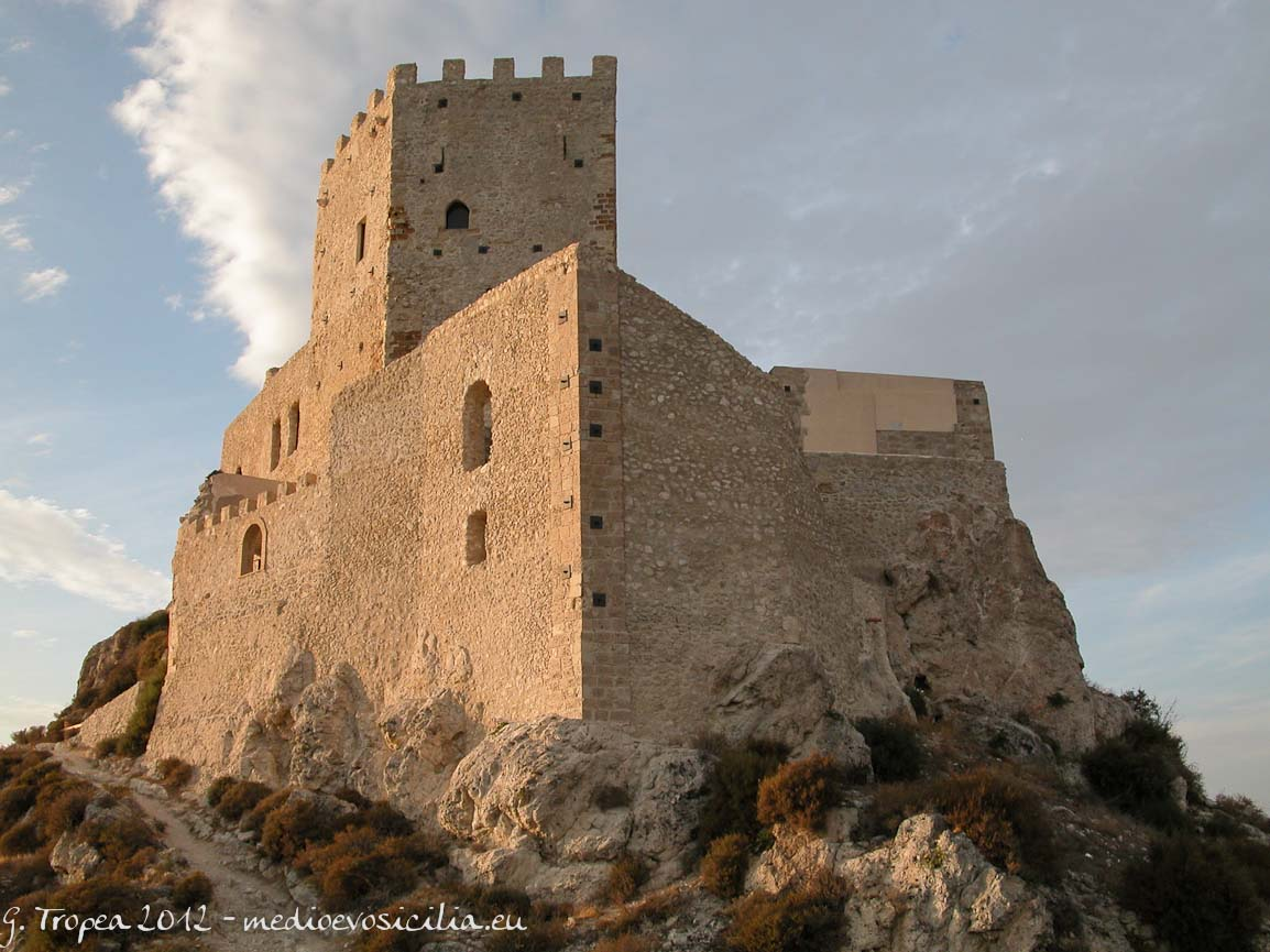 castello